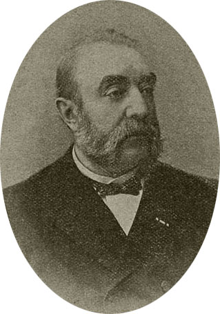 portret van Willem Boele Sophius Boeles (1832-1902)